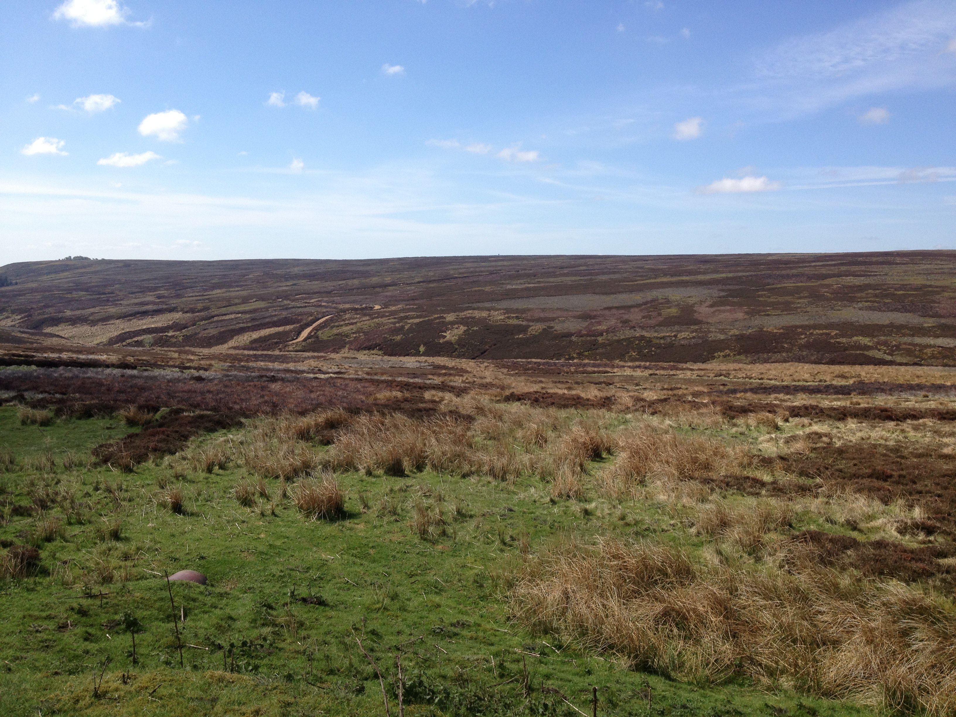 Bransdale, UK